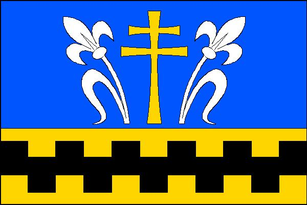 Vlajka obce Crhov